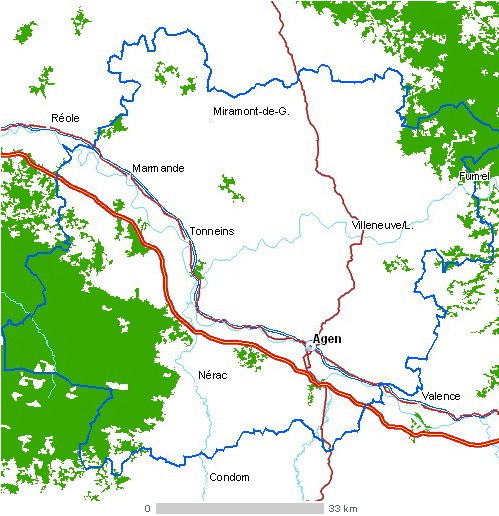 Carte du département Lot-et-Garonne Légende